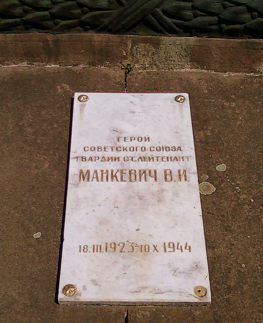 Место захоронения Героя Советского Союза Валентина Ипполитовича Манкевича (1923-1944) на Холме Славы во Львове